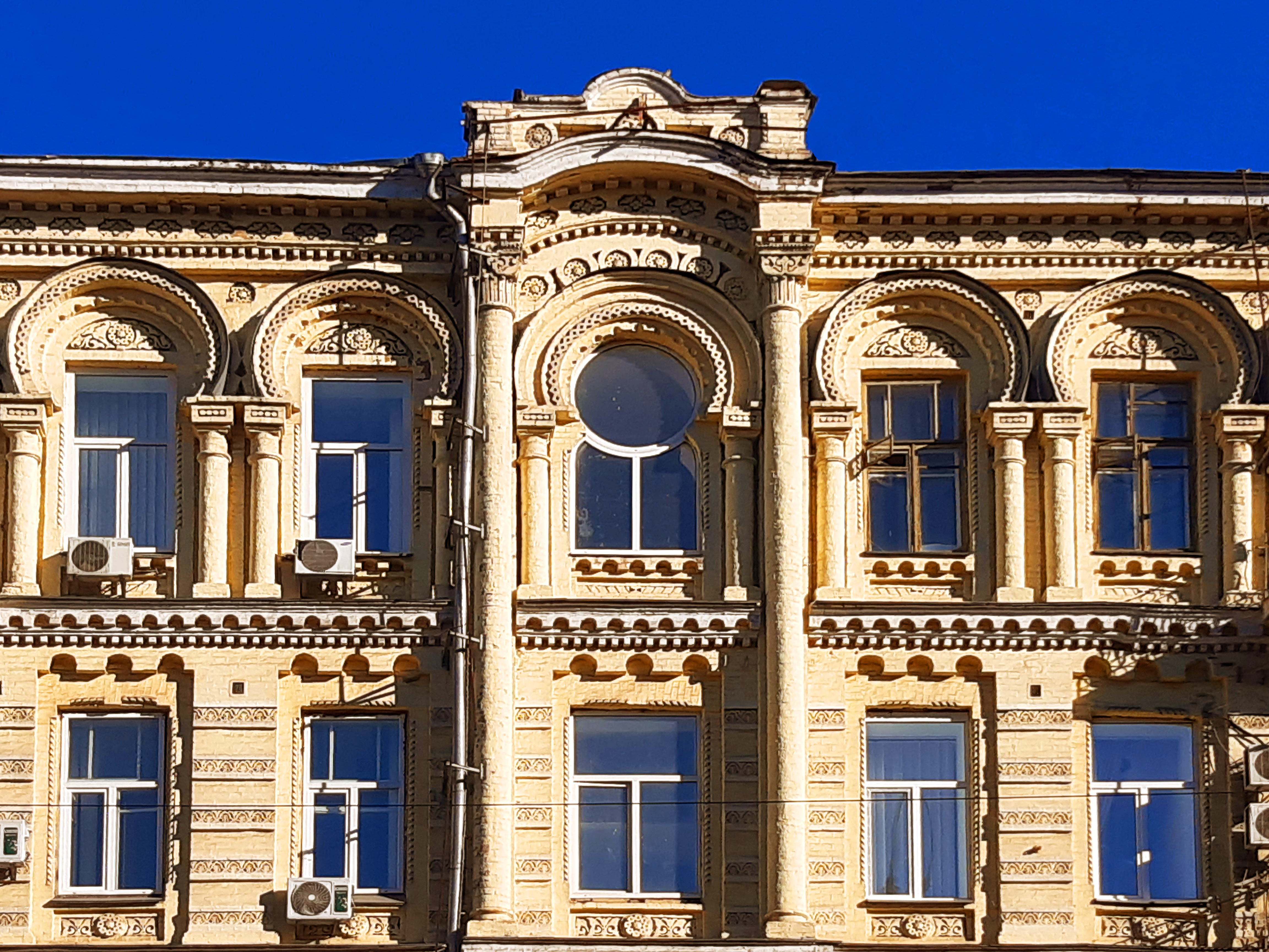 Вікна у мавританському стилі. Готель «Пале-Рояль» і прибутковий будинок, Київ, Басейна вулиця, 1/2